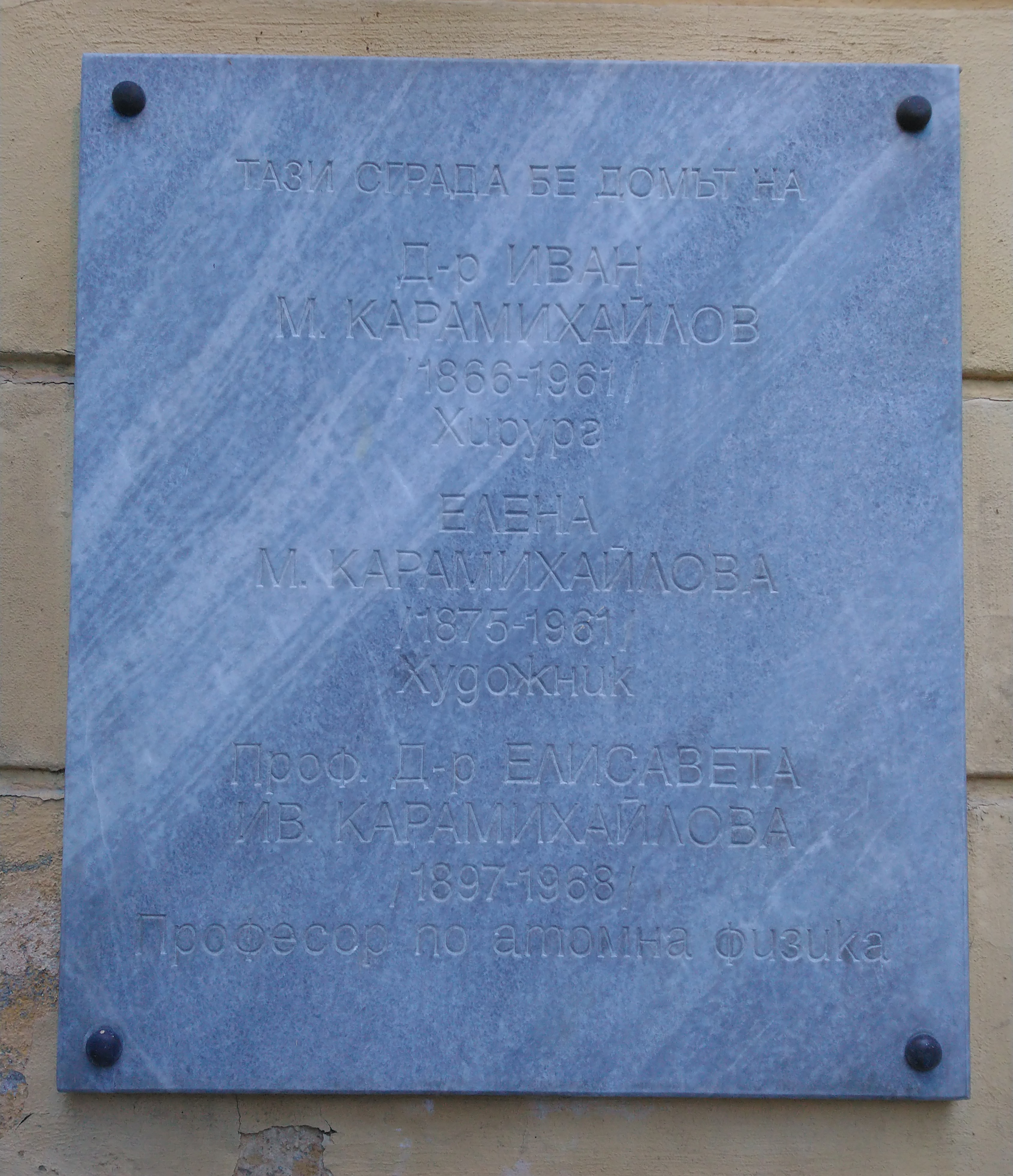 Ivan Karamihaylov, Elena Karamihaylova, Elisaveta Karamihaylova, memorial plaque, 11 Krakra Str., Sofia